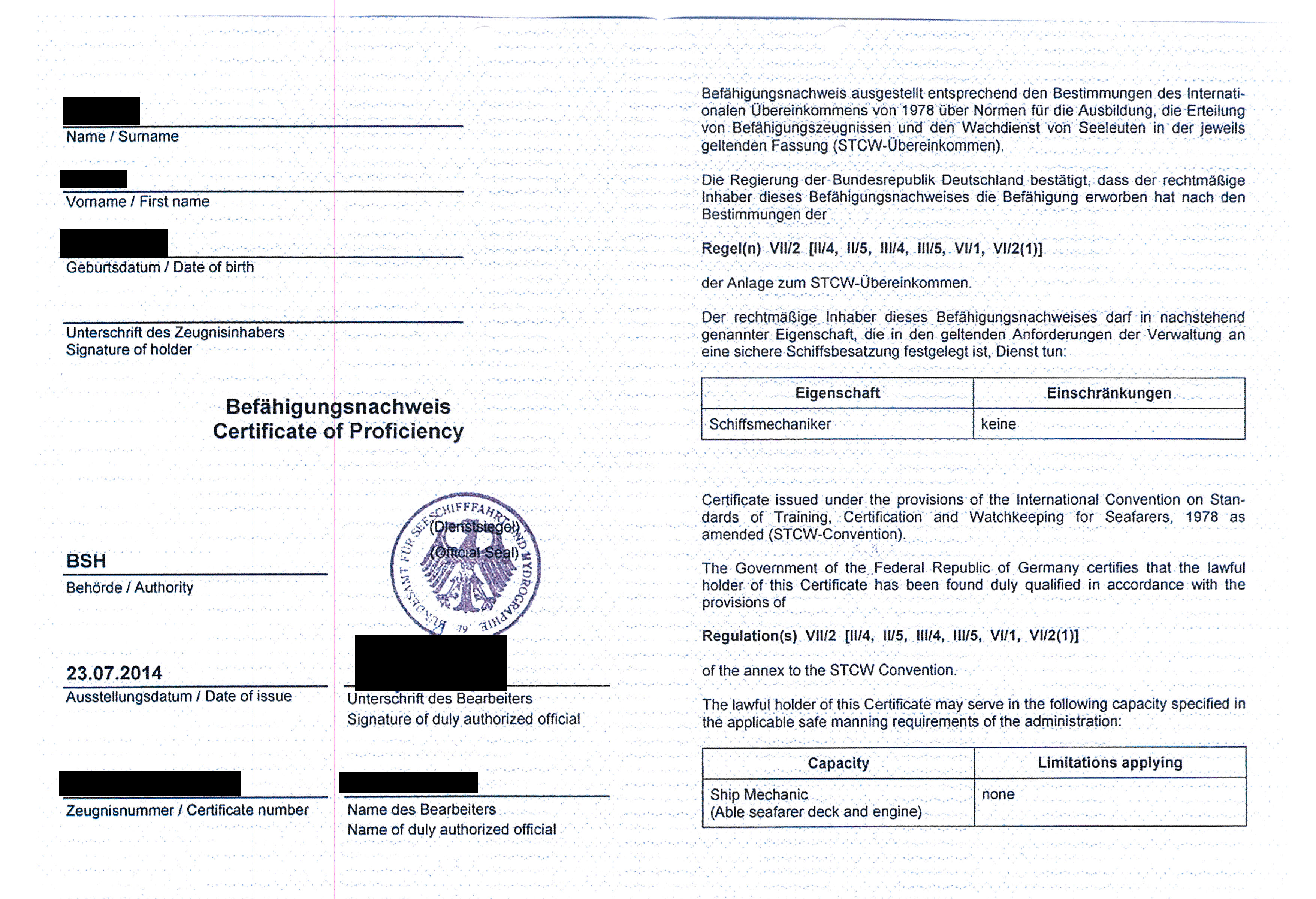 Beispiel eines deutschen Schiffsmechanikerbefähigungszeugnisses (Patent)